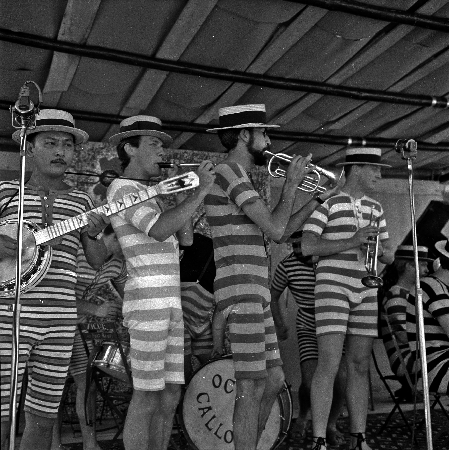 Noé (Haute-Garonne). 9 juillet 1961. Photographie de groupe de la fanfare de l'école des Beaux-Arts de Paris sur scène à l'occasion de l'élection de la "Belle gaillarde". Observation: "La Belle Gaillarde" est une éléction de miss qui a été créée à Noé (Haute-Garonne) durant l'été 1960 par Jacques Esterel, chansonnier et couturier, et Jean-Baptiste Doumeng, homme d'affaire et maire de Noé. L'élection de 1961 s'est déroulée du 8 au 10 juillet.